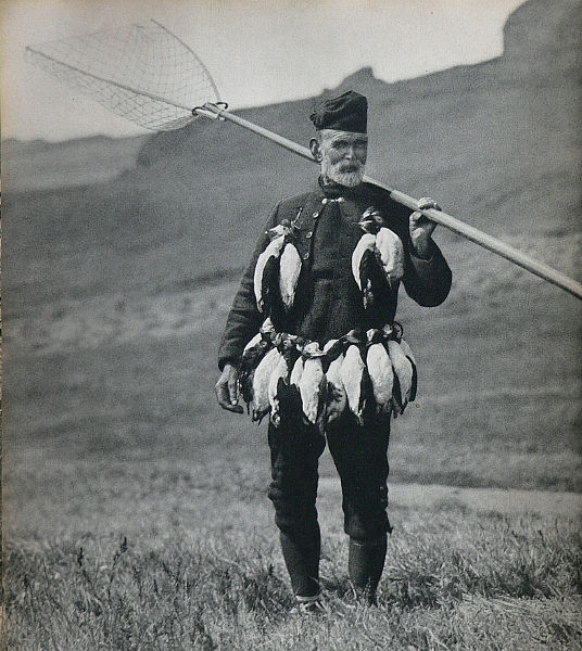 Hans Pauli Hansen (født 1866) under fuglefangst på Mykines på Færøyene.